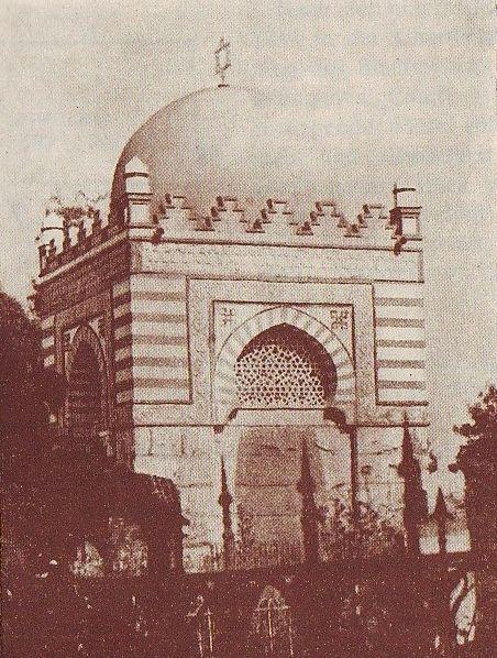 Schaje Levinovitschi kabel-mausoleum vanal juudi kalmistul Magasini tänaval.